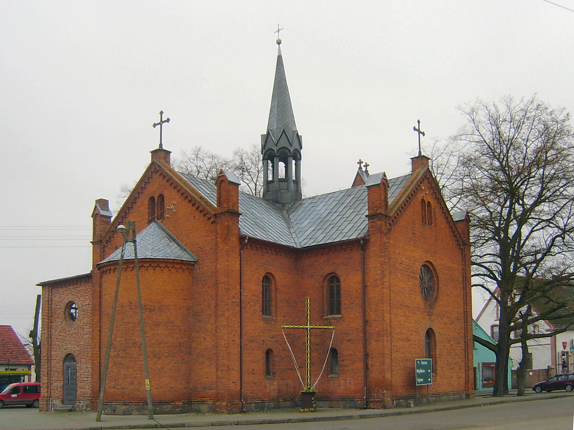 Lubiszyn - kościół, powiat gorzowski, woj. lubuskie, Poland